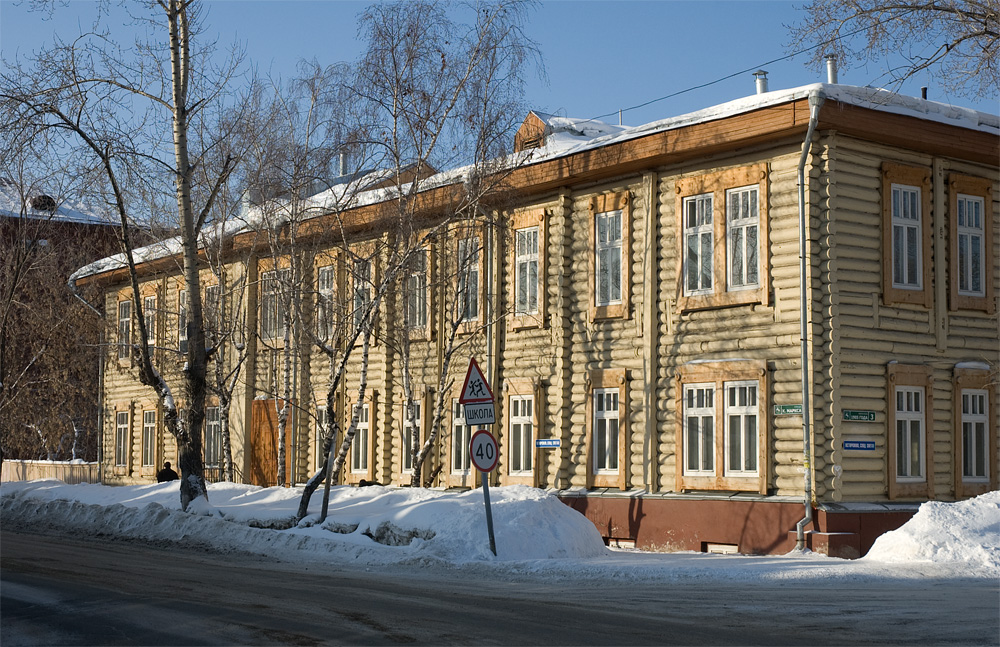 улица Карла Маркса, 28 / переулок 1905 года, 3, Томск